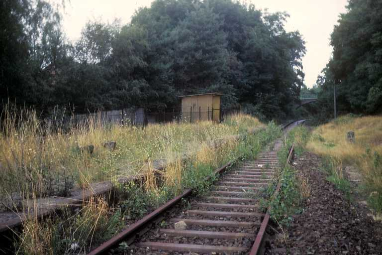 Haltepunkt Birgelen 1983 * Quelle: Sammlung B.Dohmen, Archiv-Nr. 9/31 * Fotograf: Benedikt Dohmen, User:Benedictus * Copyright Status: GNU Freie Dokumentationslizenz